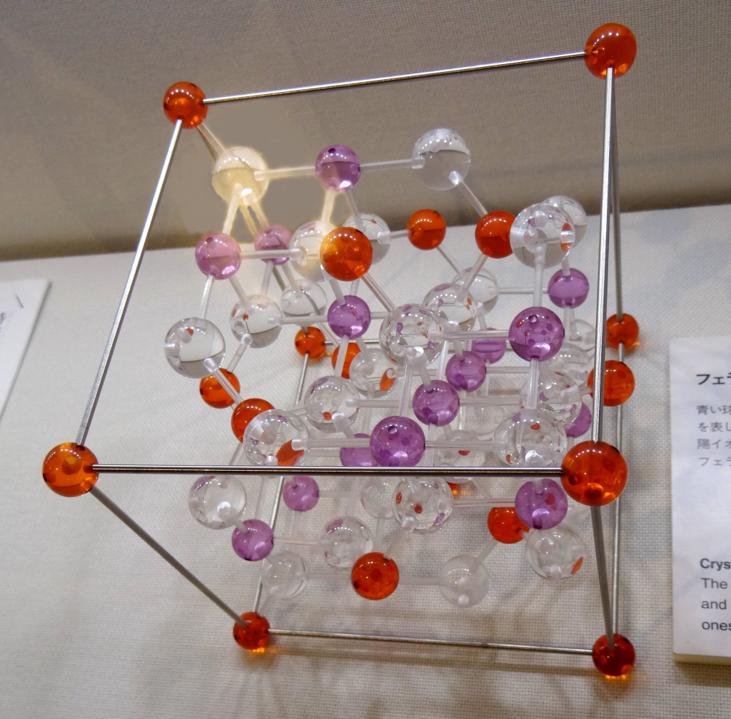 フェライトの結晶構造模型。東京工業大学博物館所蔵。